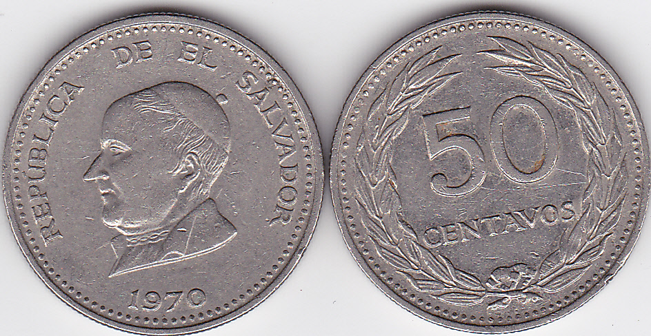 50 centavos de Colón de 1970.jpg